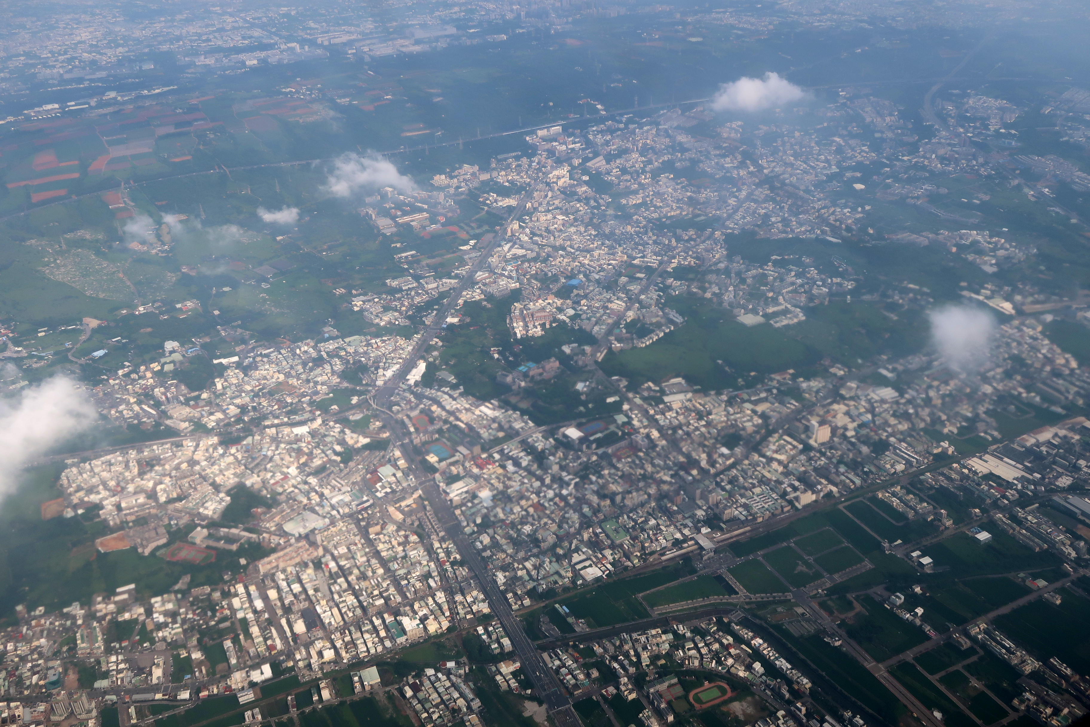 Shalu District, Taichung